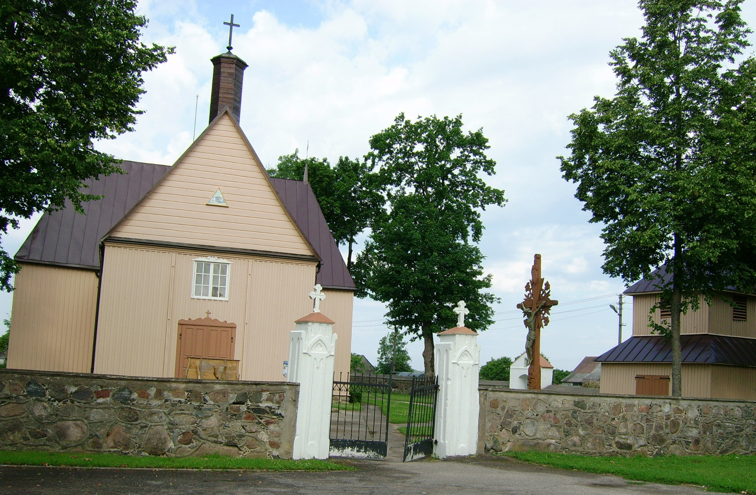 Didkiemio Bažnyčia